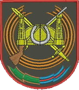 Нарукавный знак 17-й ОМСБр (Шали)